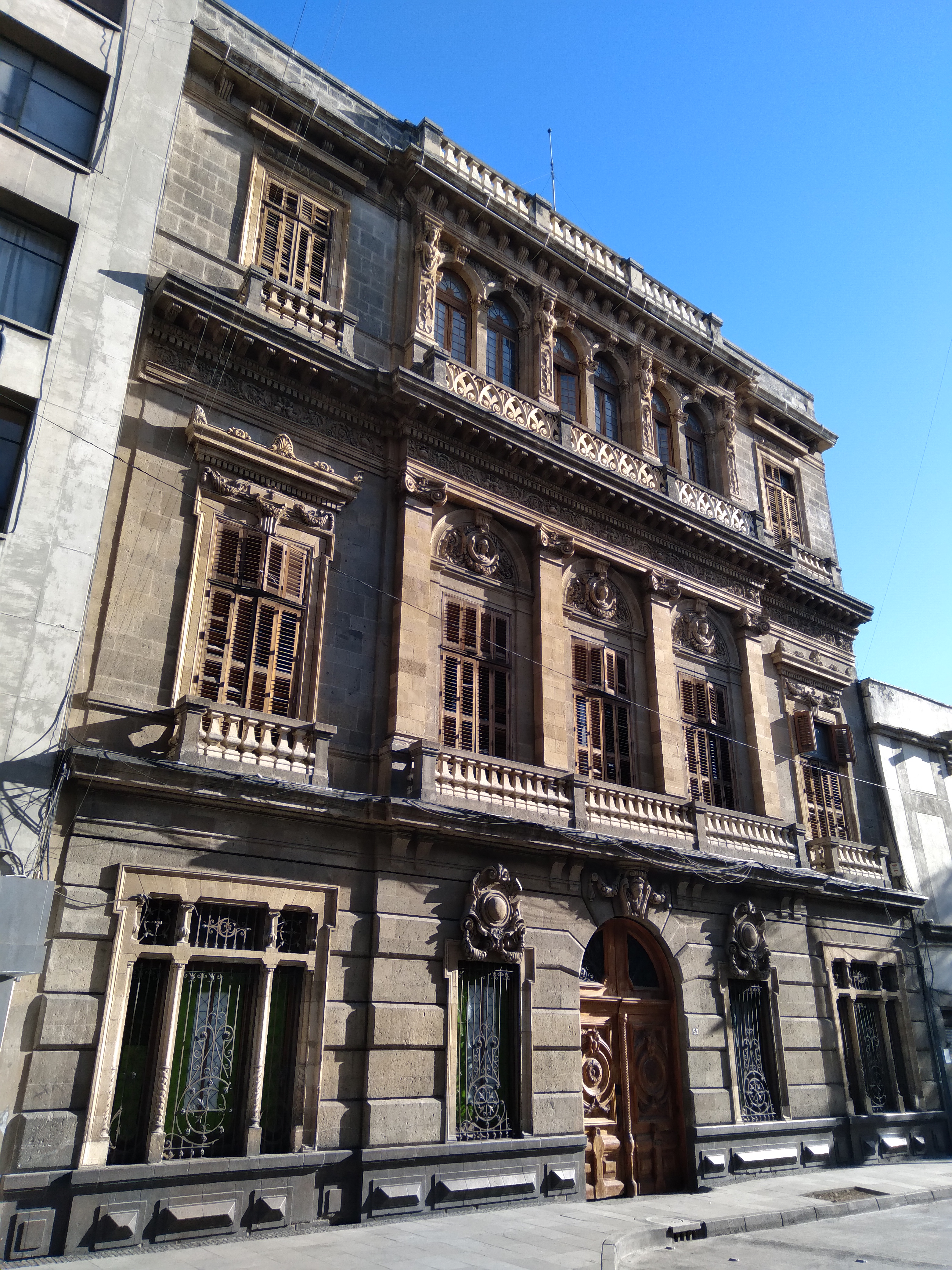 Fachada de la antigua escuela de economía en la ciudad de México